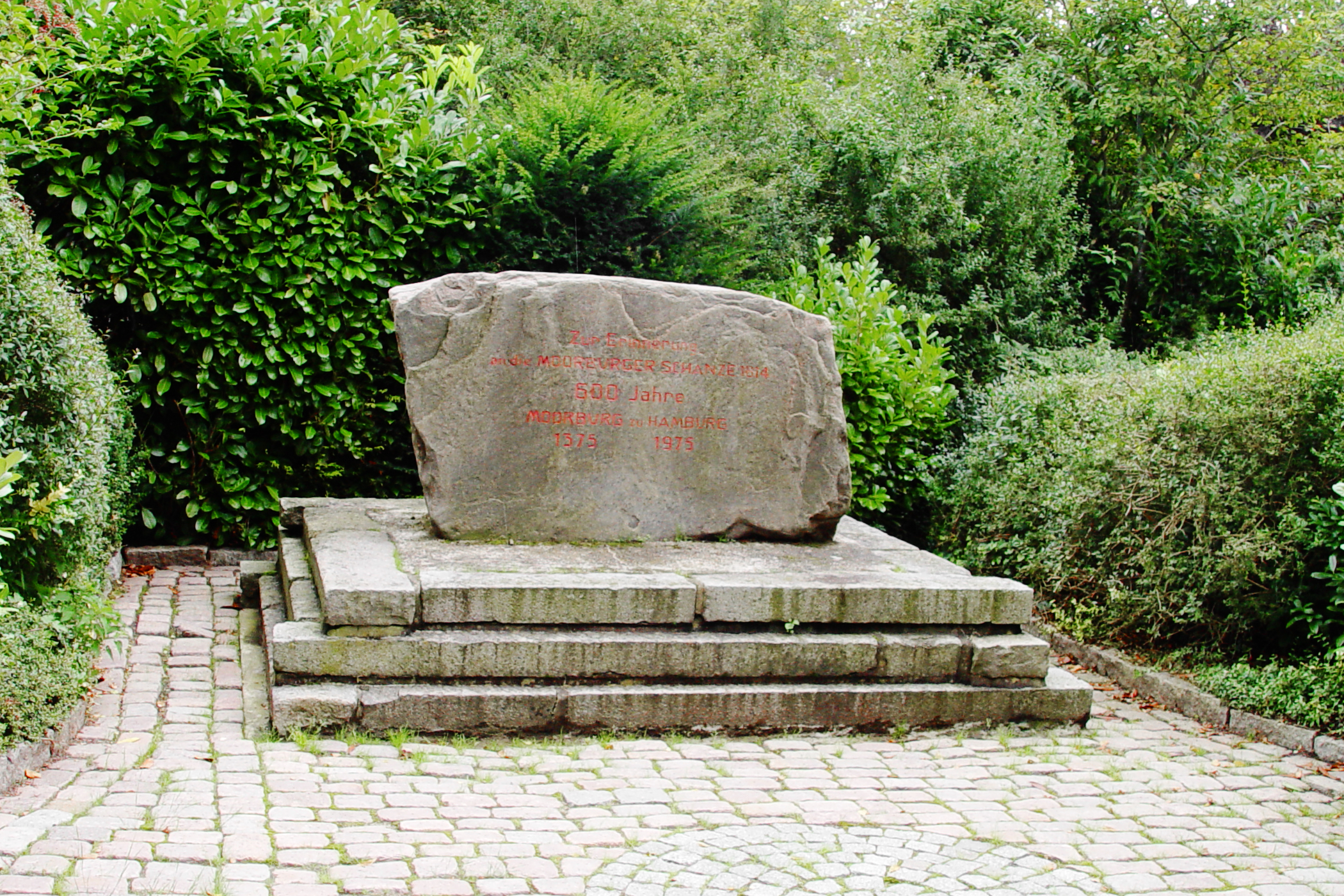 Hamburg, Bezirk Harburg, Stadtteil Moorburg, Denkmal am Moorburger Kirchdeich zur Schlacht an der Moorburger Schanze im Jahre 1814